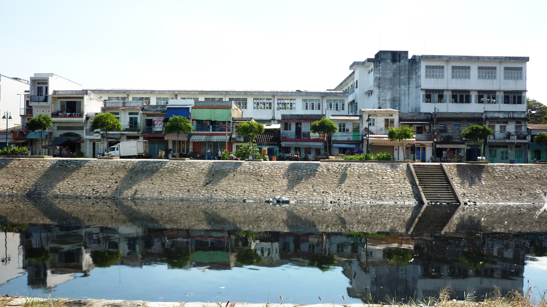 Một dãy nhà xây bên dòng kênh Tàu Hũ thuộc quận 8.